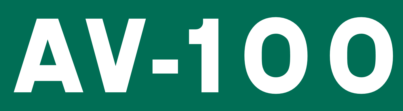 Cajetín de la carretera autonómica AV-100